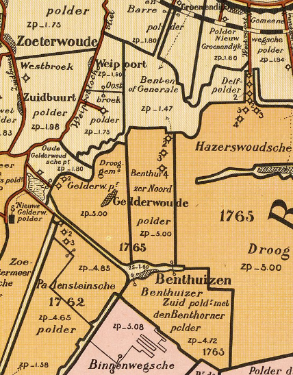 Benthuizerpolder